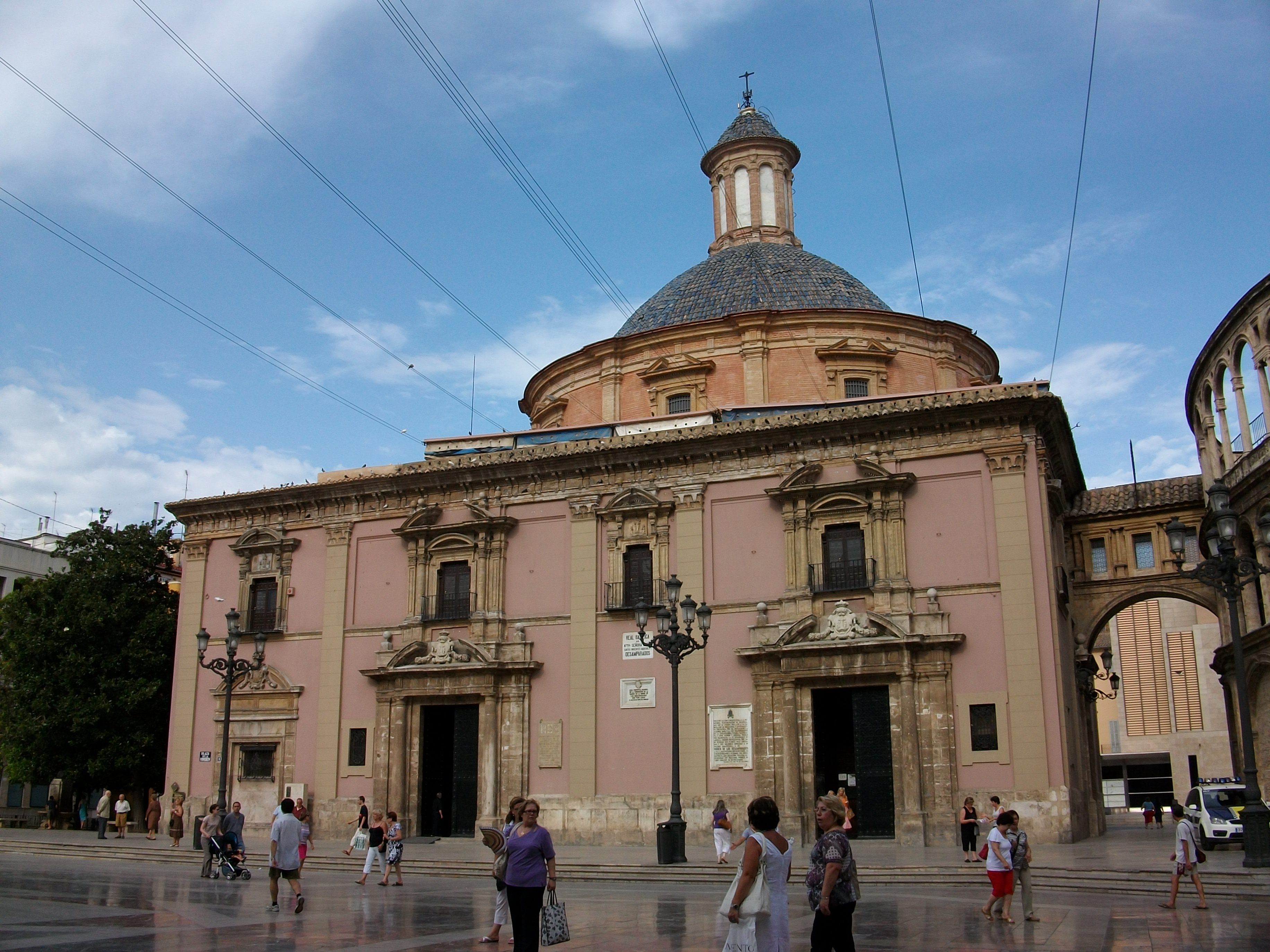 Exterior de la basílica de la Mare de Déu dels Desemparrats, a la Plaça de la Verge de la ciutat de València.